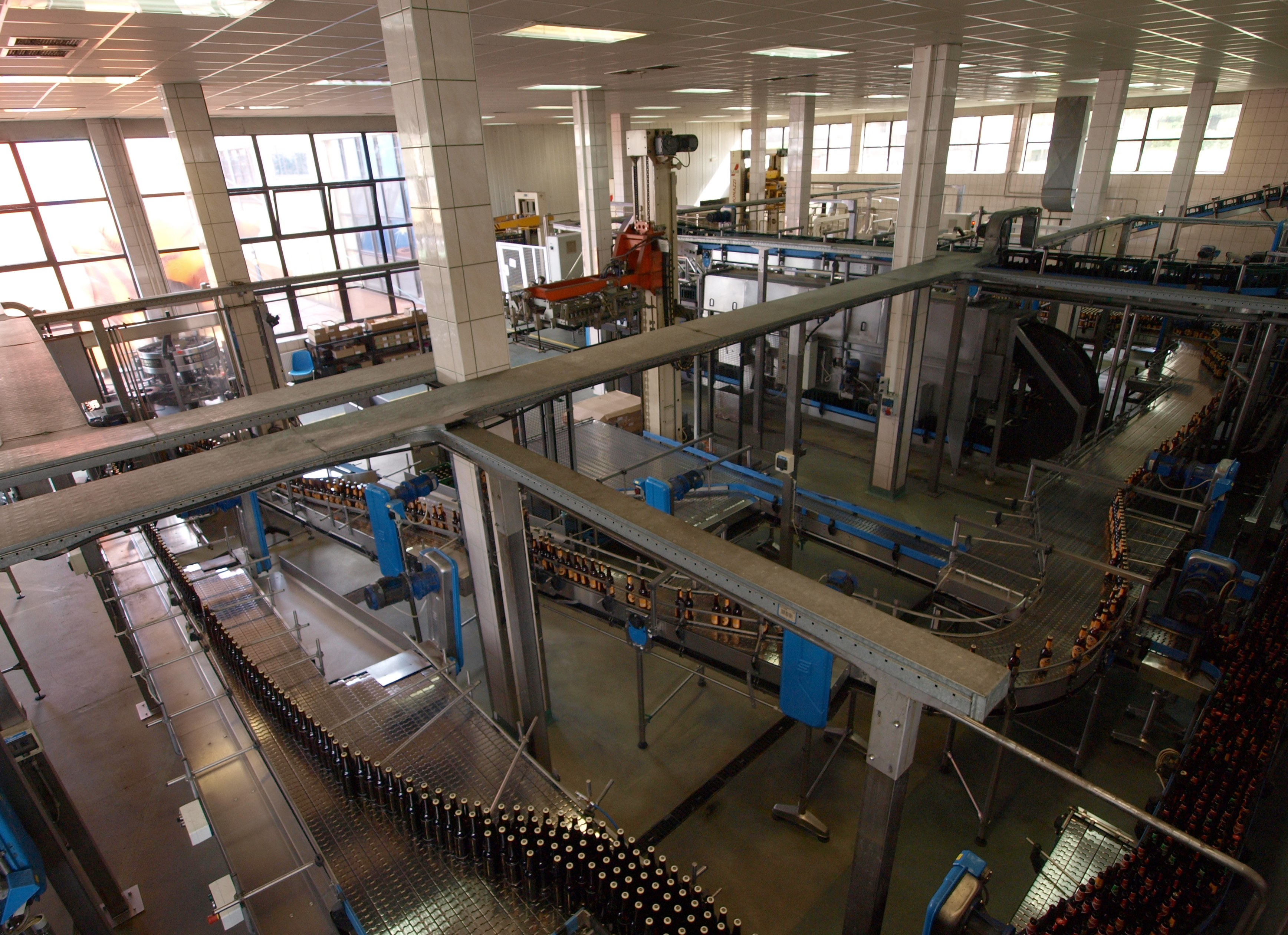 Browary Górnośląskie w Zabrzu. Rozlewnia piwa butelkowego.